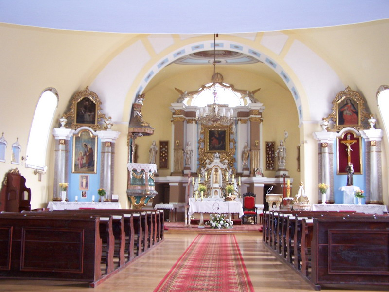 Polska, Lutynia, woj. wielkopolskie, powiat pleszewski, gmina Dobrzyca Kościół pw. Wniebowzięcia Najświętszej Maryi Panny